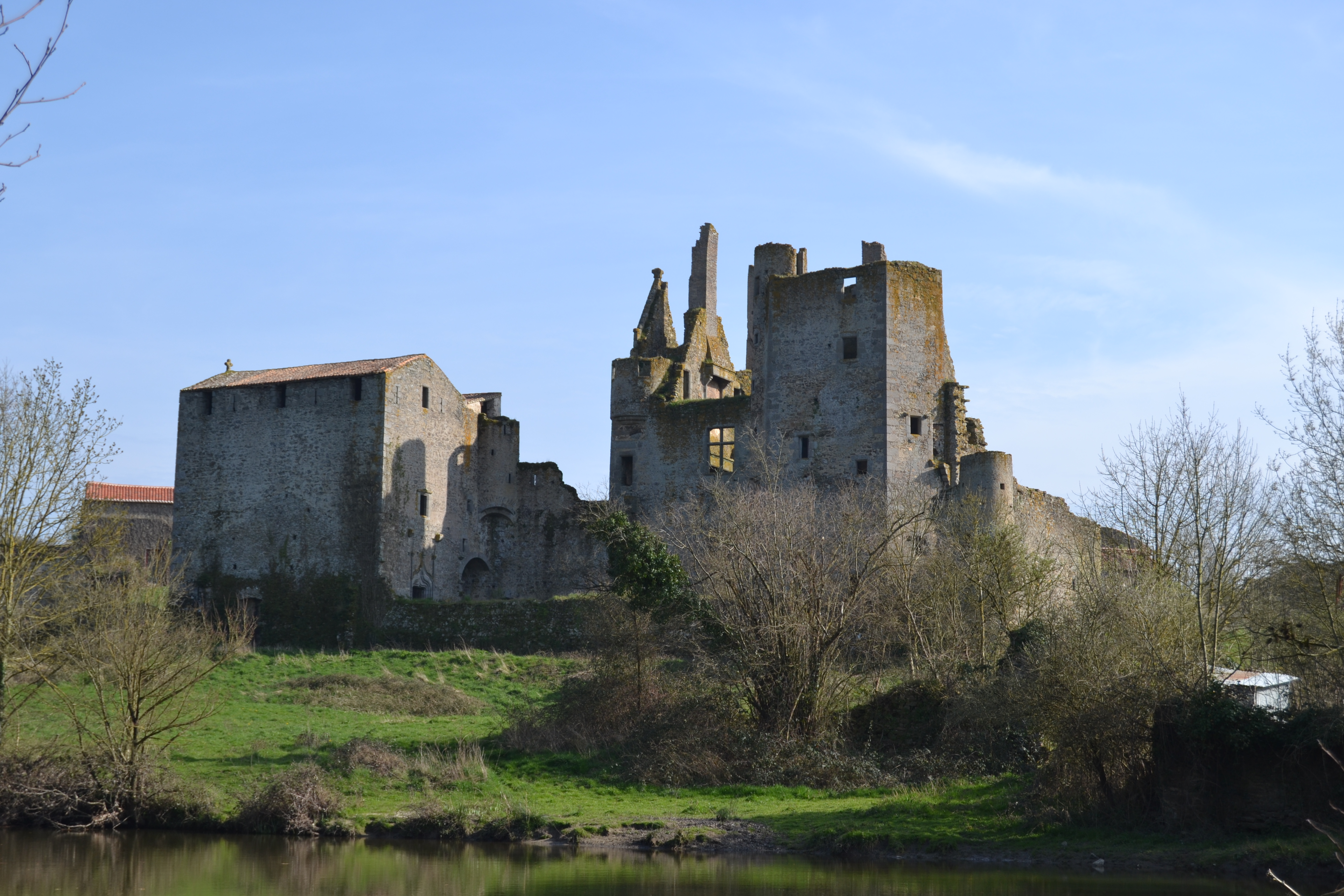 Vue Globale du Château de Glenay (79)